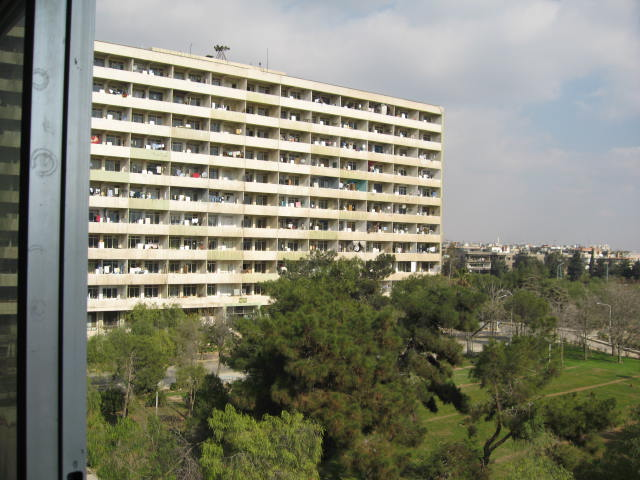 صورة للوحدة الأولي في مدينة باسل الأسد الجامعية في دمشق